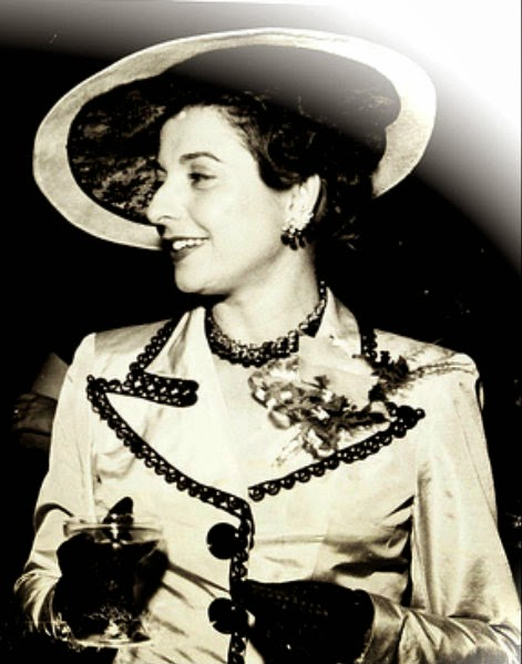 Primera dama de Guatemala, fotografía tomada durante una visita a un hospital en 1944.